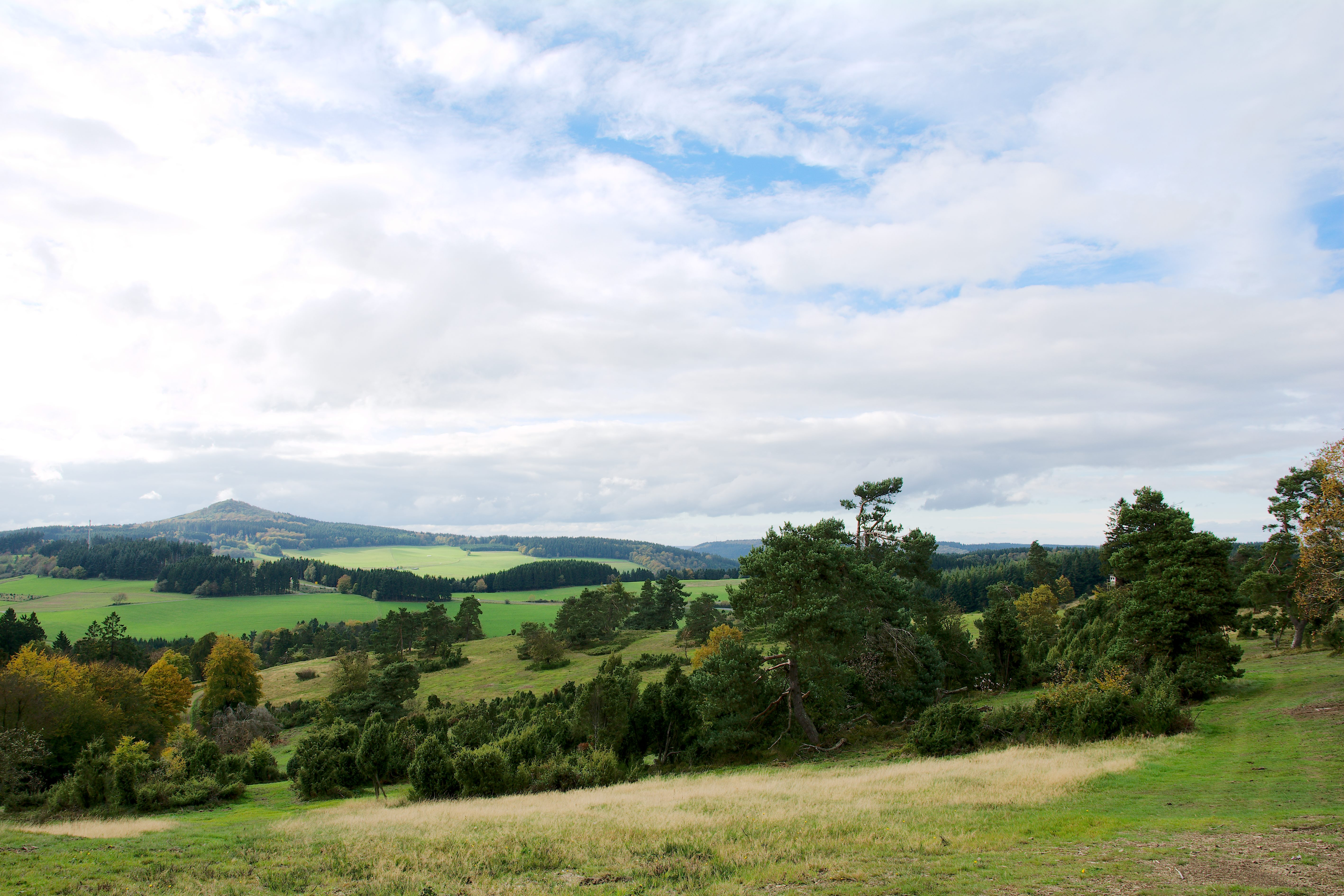 Landschaftsansicht mit Wacholderheide im Naturschutzgebiet „Dr. Heinrich-Menke-Park“ (NSG 7137-027) in Arft, Landkreis Mayen-Koblenz, Rheinland-Pfalz